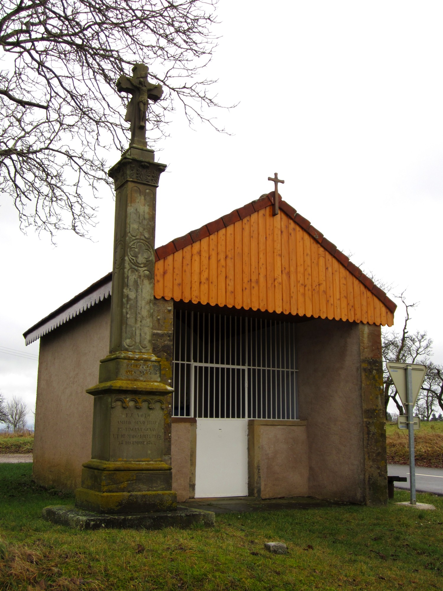 Village de Dignonville - La chapelle et son calvaire